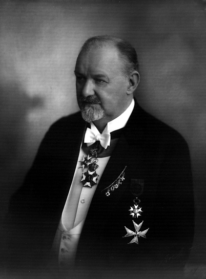 Yngve Sjöstedt